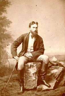 Keglevich István gróf (1840-1905), a Nemzeti Színház, az Operaház és a Vígszínház intendánsa kb. 32 éves korában